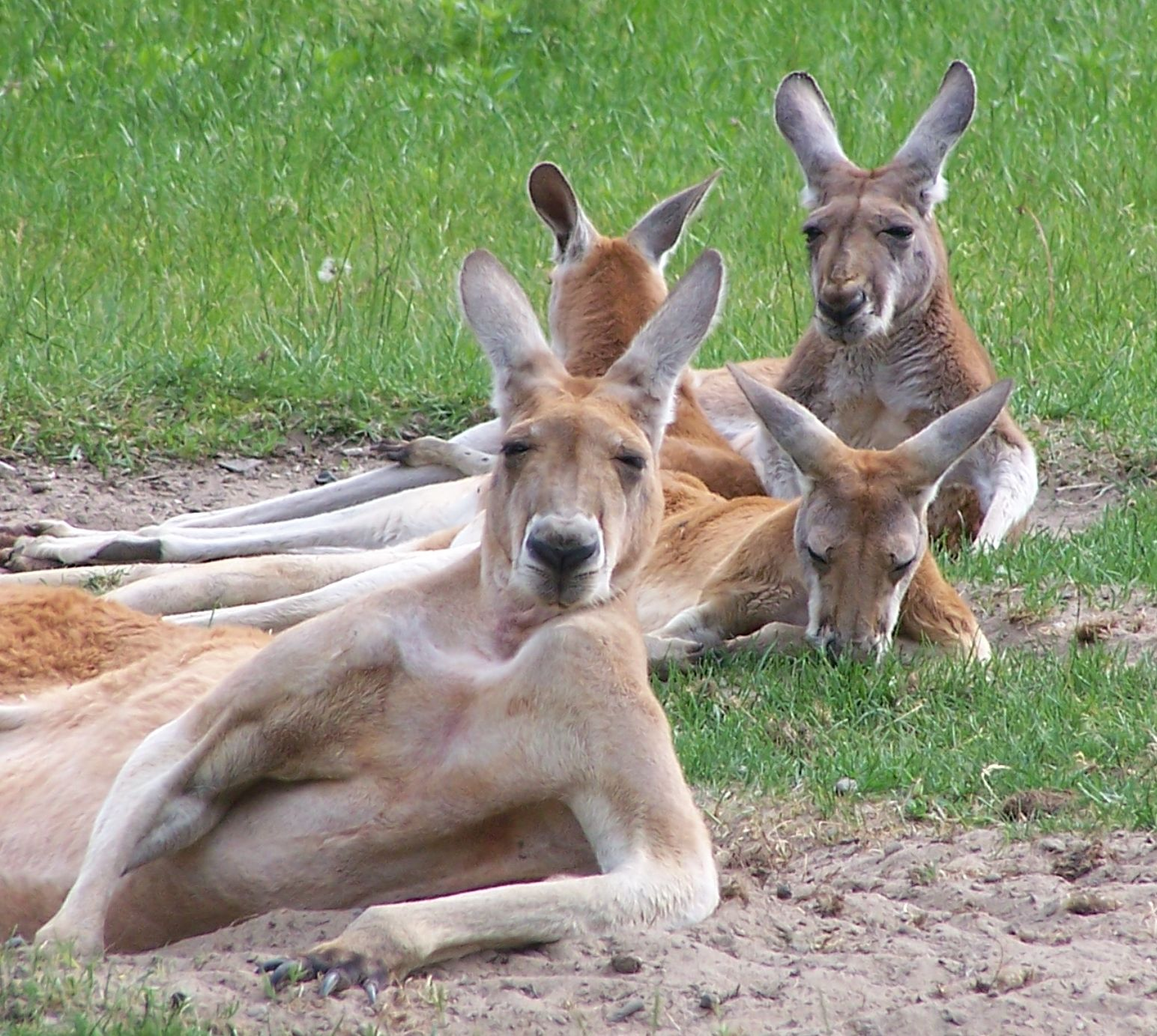 Kangury w płockim zoo